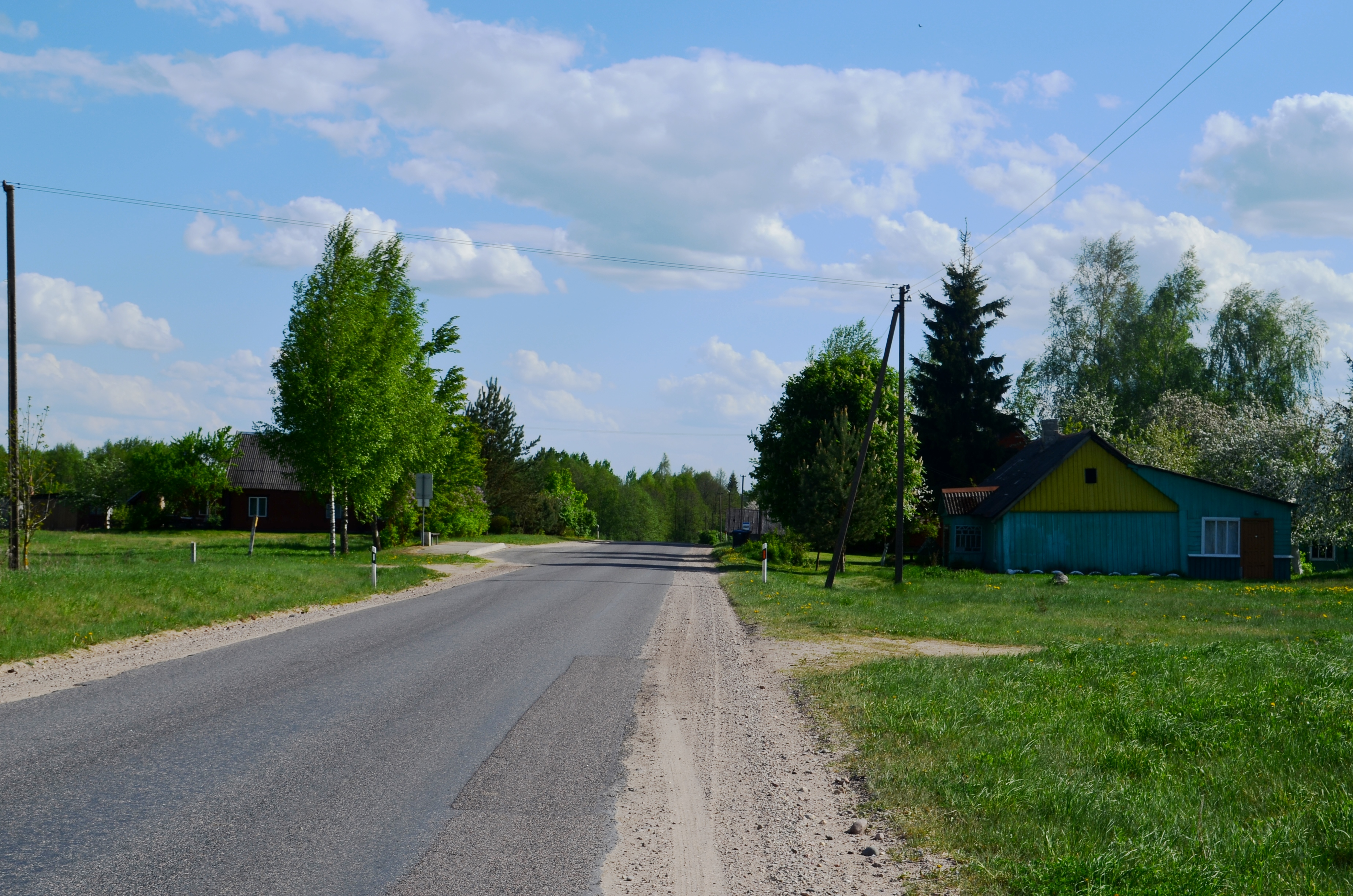 Užtilčiai, Inturkės sen., Molėtų raj.